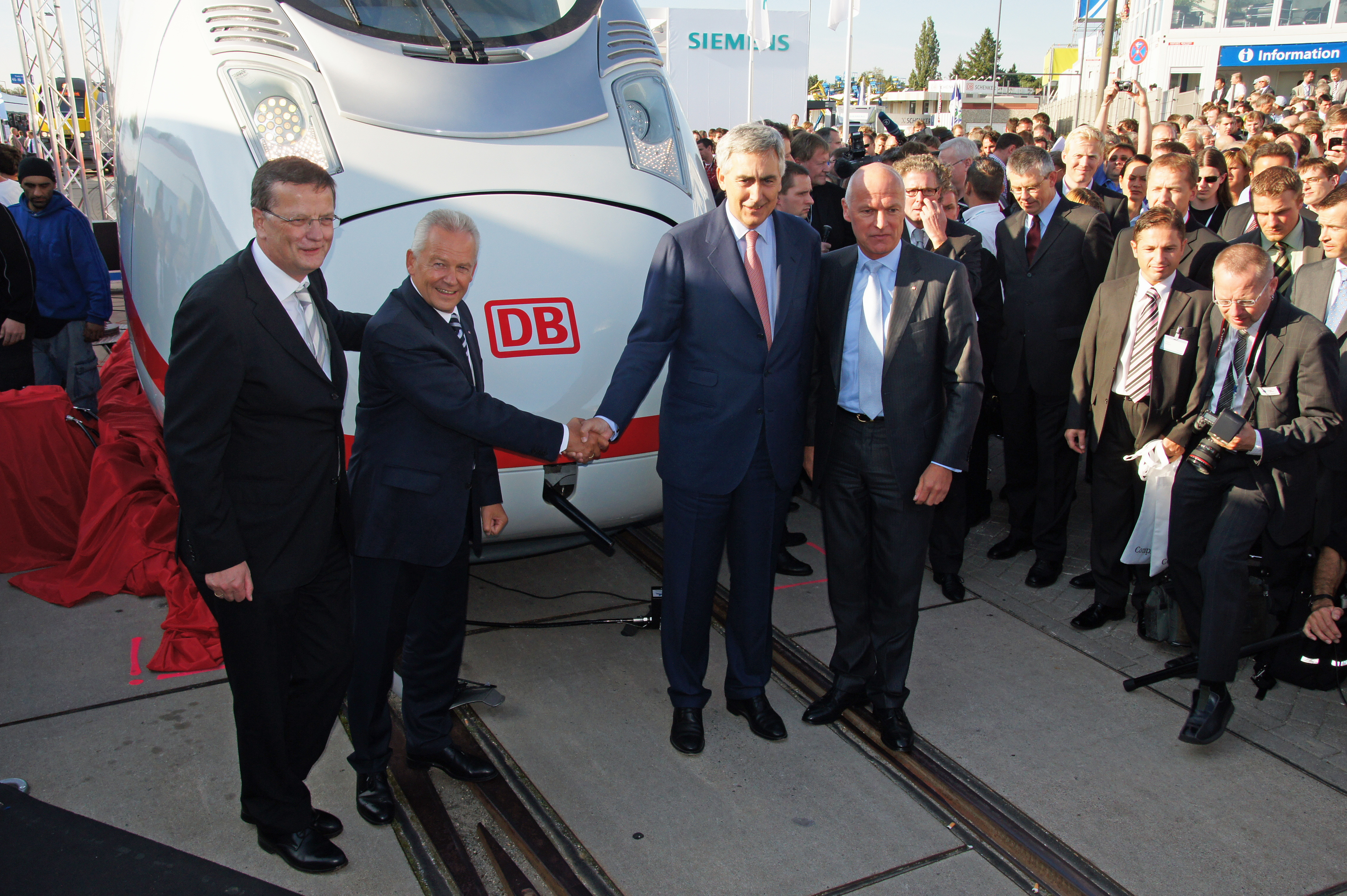 Übergabe des Velaro D an die Deutsche Bahn, Bahnchef Rüdiger Grube(links) und Siemensvorstand Peter Löscher(rechts)